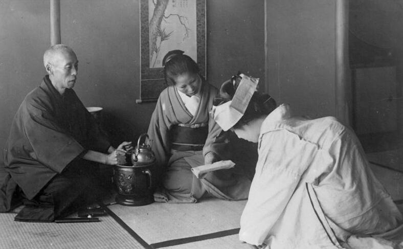 5 Uhr-Tee in Japan! In feierlicher Zeremonie wird dem Gastgeber ein Teepäckchen überreicht, welcher von dem Hausherrn äusserst geschmackvoll eigenhändig zubereitet wird.